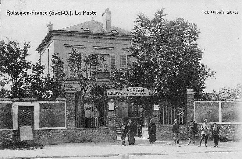 Roissy-en-France (Seine-et-Oise, France) - La Poste.